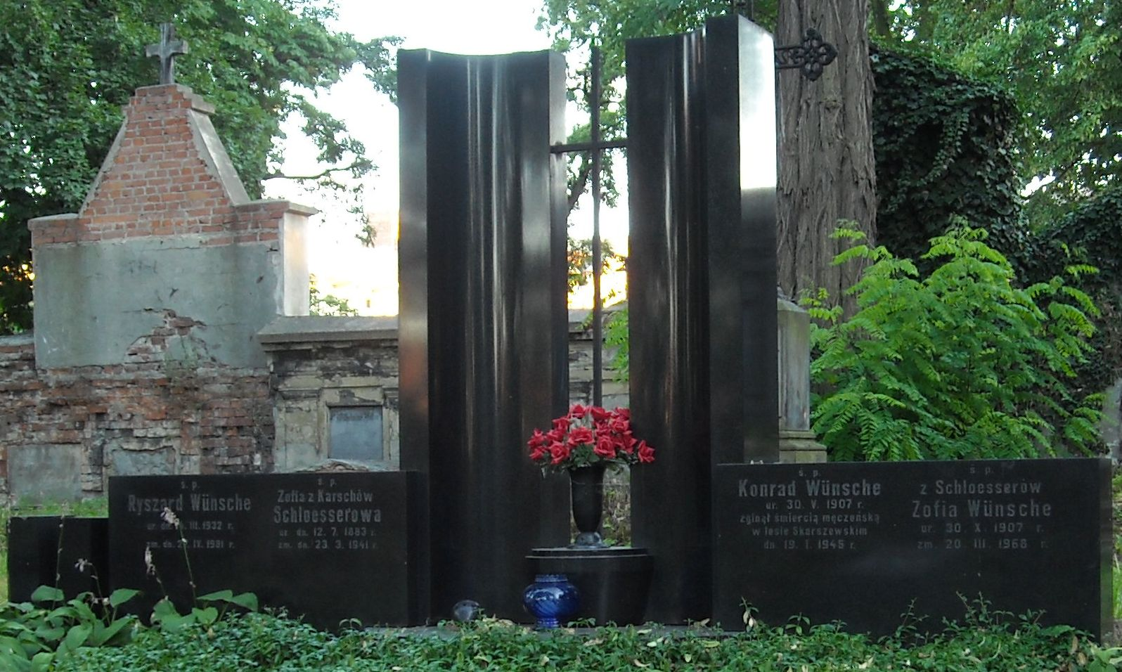 Grobowiec rodziny Wunsche na Cmentarzu Ewangelickim w Kaliszu